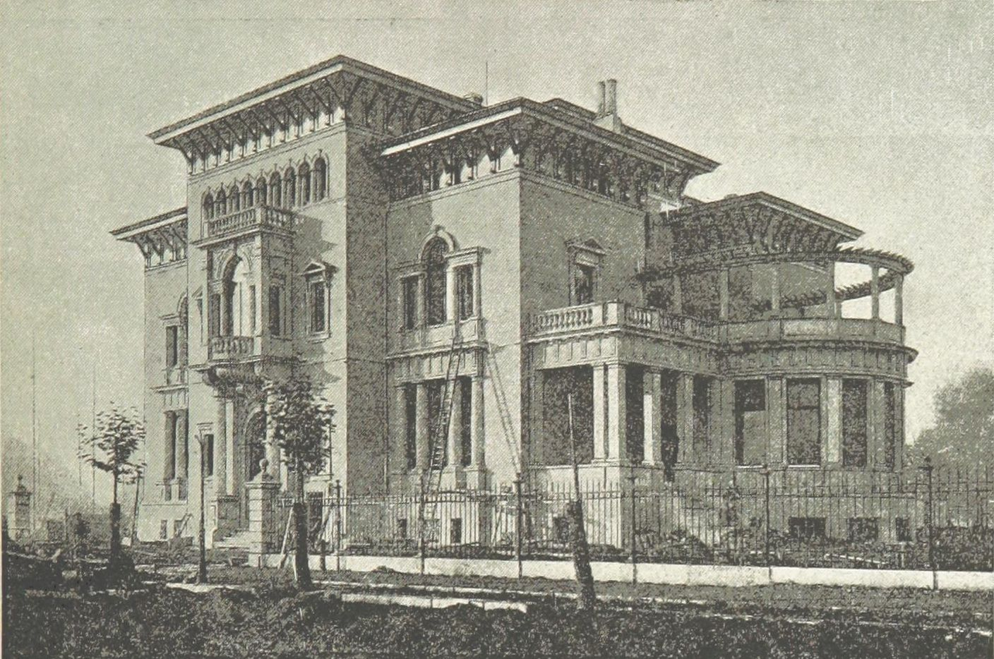 Villa Karl Beckmann in der Ferdinand-Rhode-Straße 4 in Leipzig - Ansicht